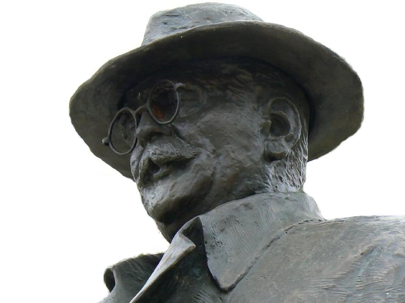 Nagy Imre-szobor (Lapis András, 2003). - Magyarország, Csongrád megye, Szeged, Rákóczi tér